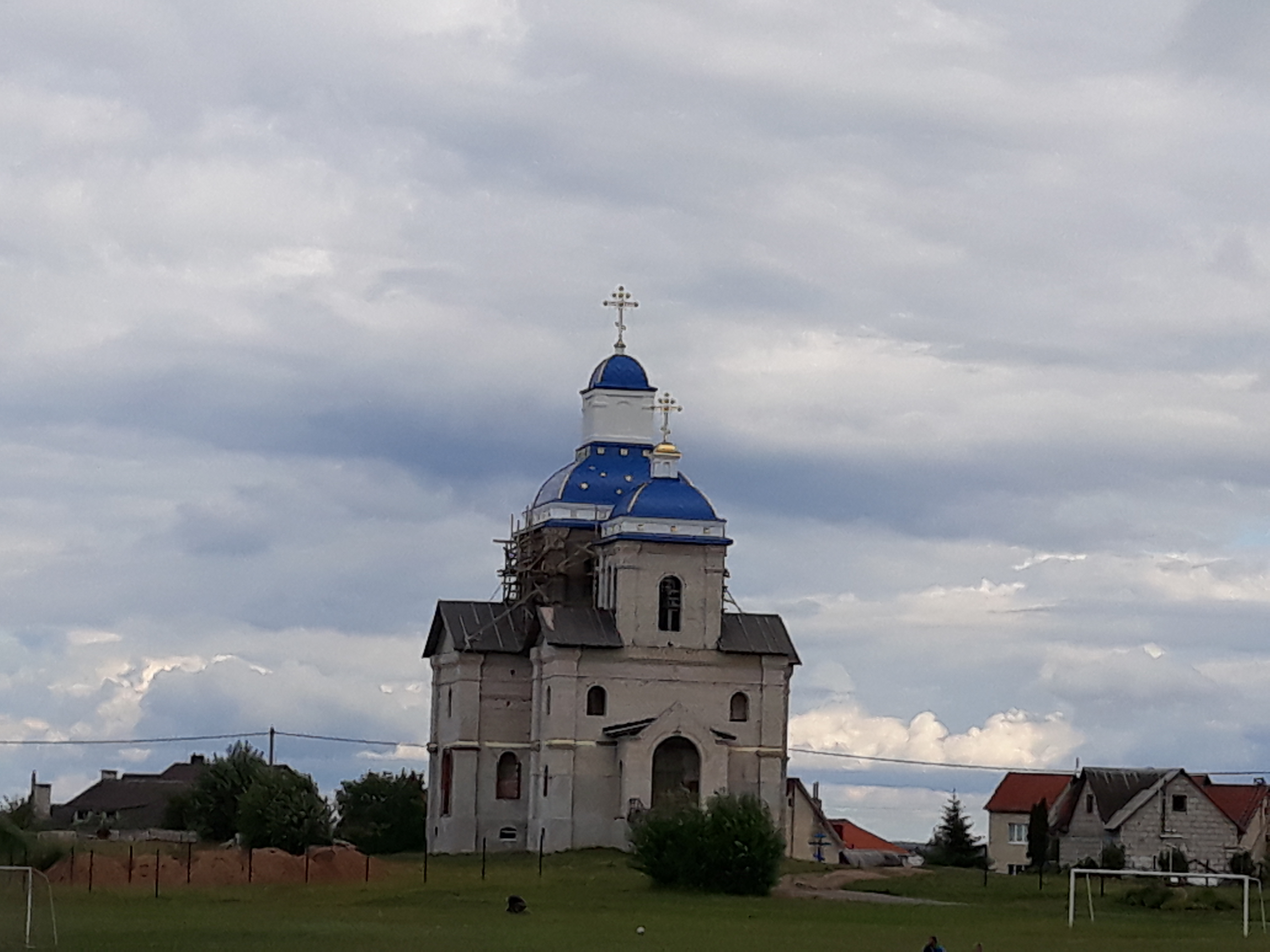 Азярыцкая Слабада. Смалявіцкі раён. краявіды